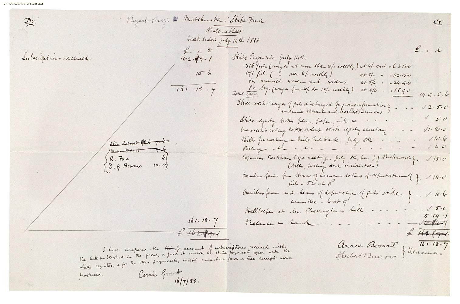 Strike Fund Balance Sheet of the Matchmakers Union, 14 July 1888